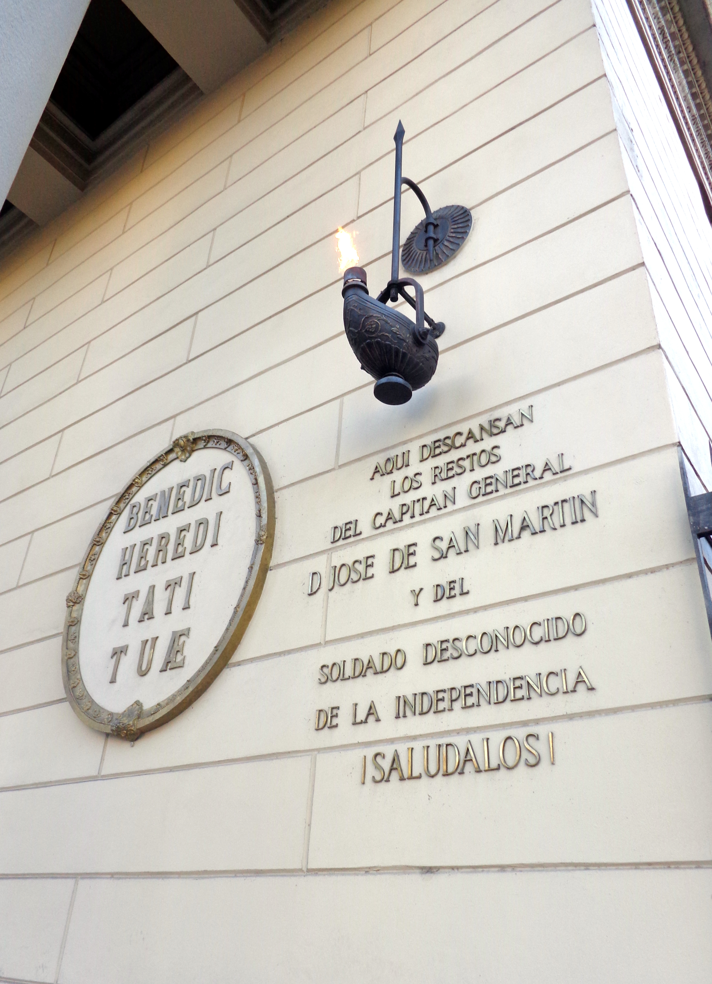 Lámpara votiva en la Catedral Metropolitana de Buenos Aires, Argentina, que dice "Aquí descansan los restos del Capitán General Don José de San Martín y del soldado desconocido de la Independencia. ¡Salúdalo!"